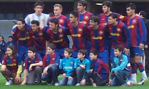 Starting eleven of FC Barcelona B against CF Vilanova i Geltrú, 24 February 2008, with: Oier Olazábal, Abraham González, José Manuel Flores "Chico", Marc Valientem Dimas Delgado (above); Gai Assulin, Pedrito Rodríguez, Víctor Espasandín, Víctor Vázquez, Víctor Sánchez and David Córcoles (left to right).